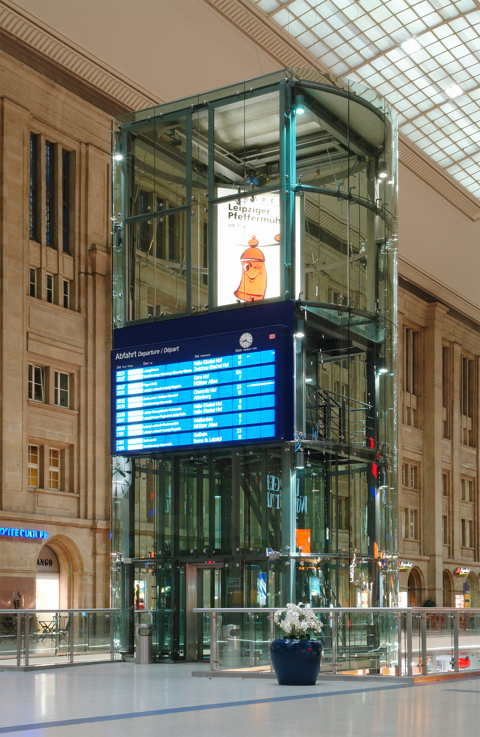 Fahrstuhlturm im Leipziger Hauptbahnhof